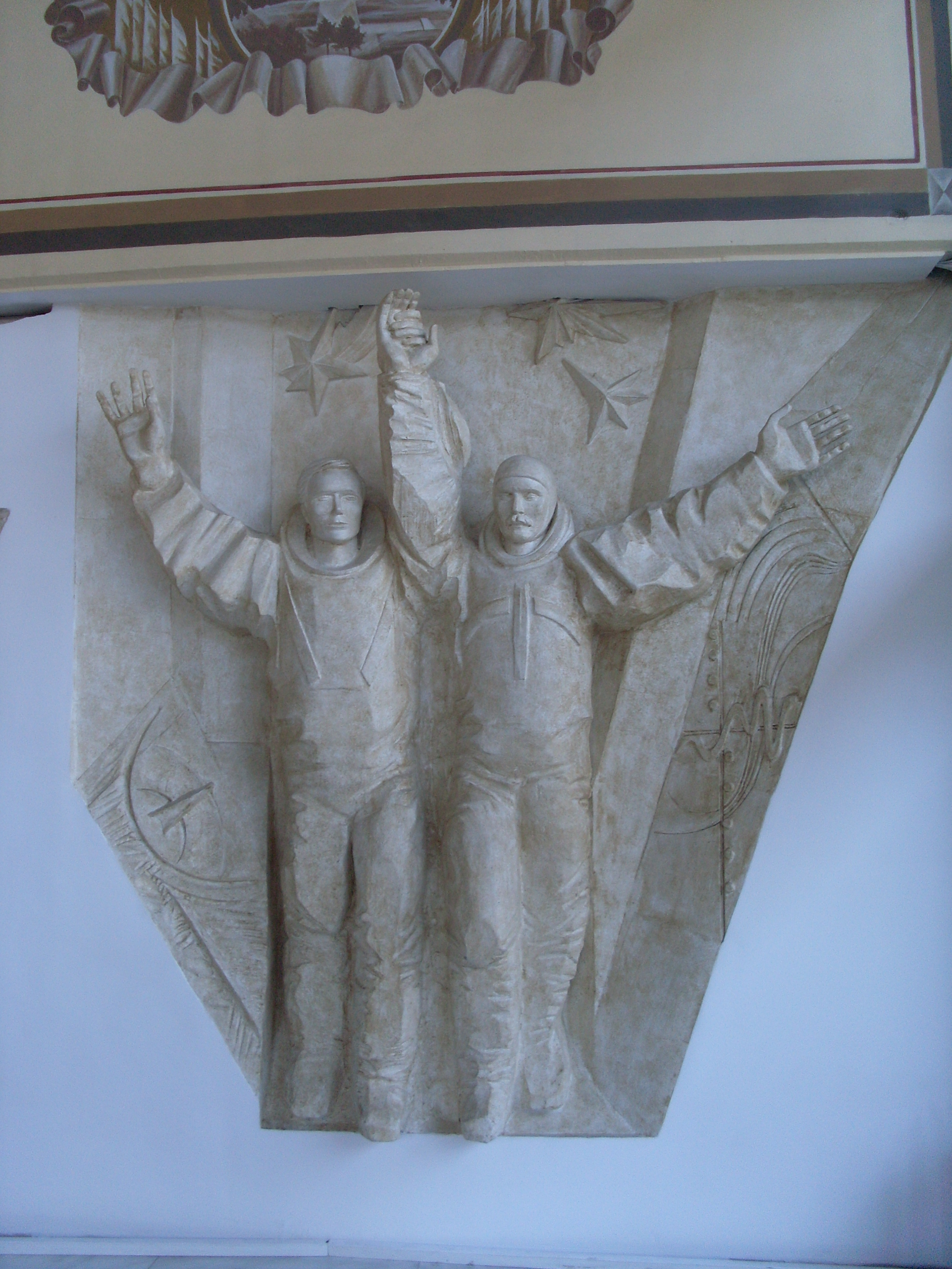 Astronautas, Centro cultural ruso en Sofia, Bulgaria, 2011